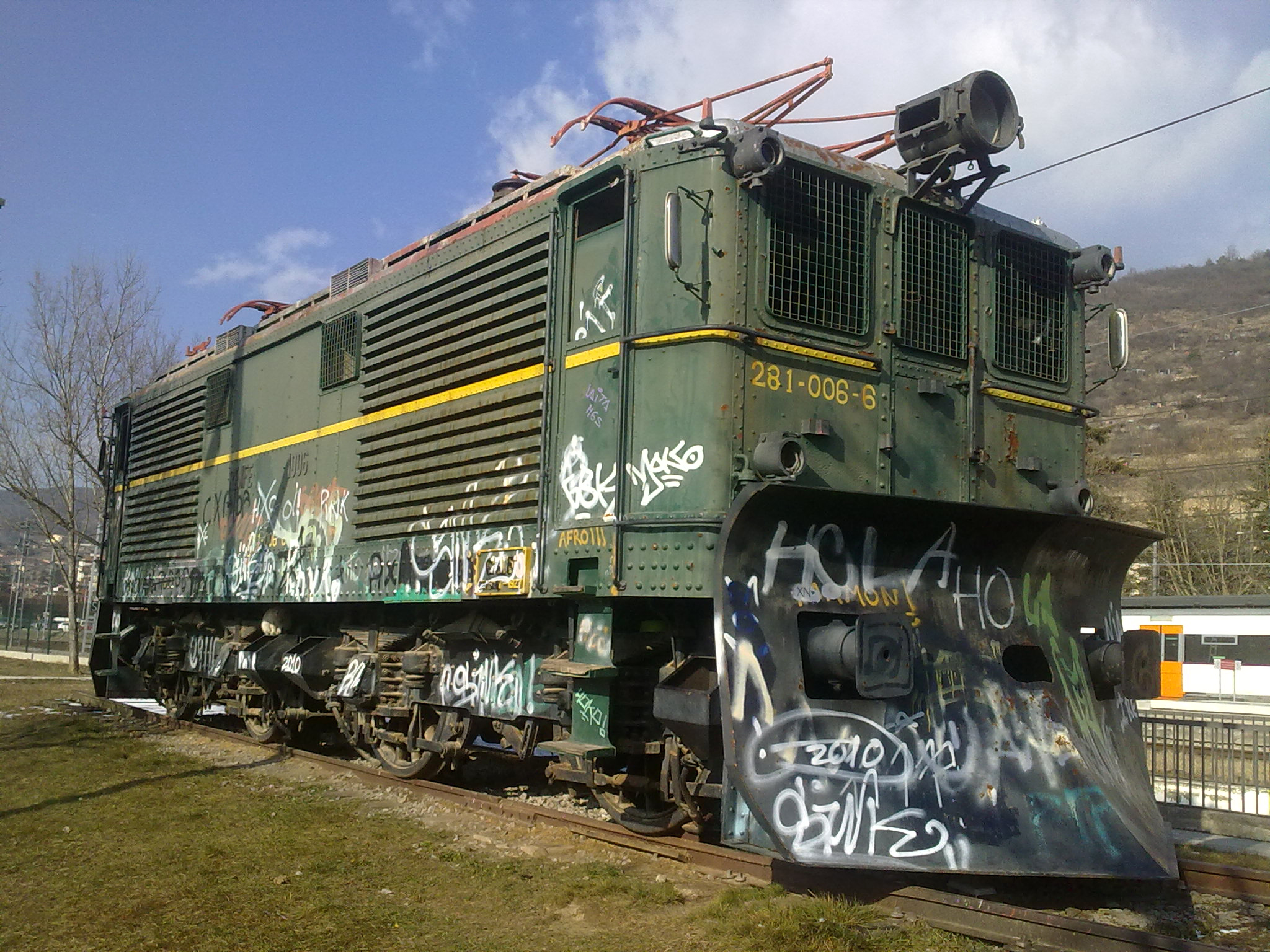 Exemplar de locomotora de la sèrie 1000 de Renfe exposat davant l'estació de Ripoll.